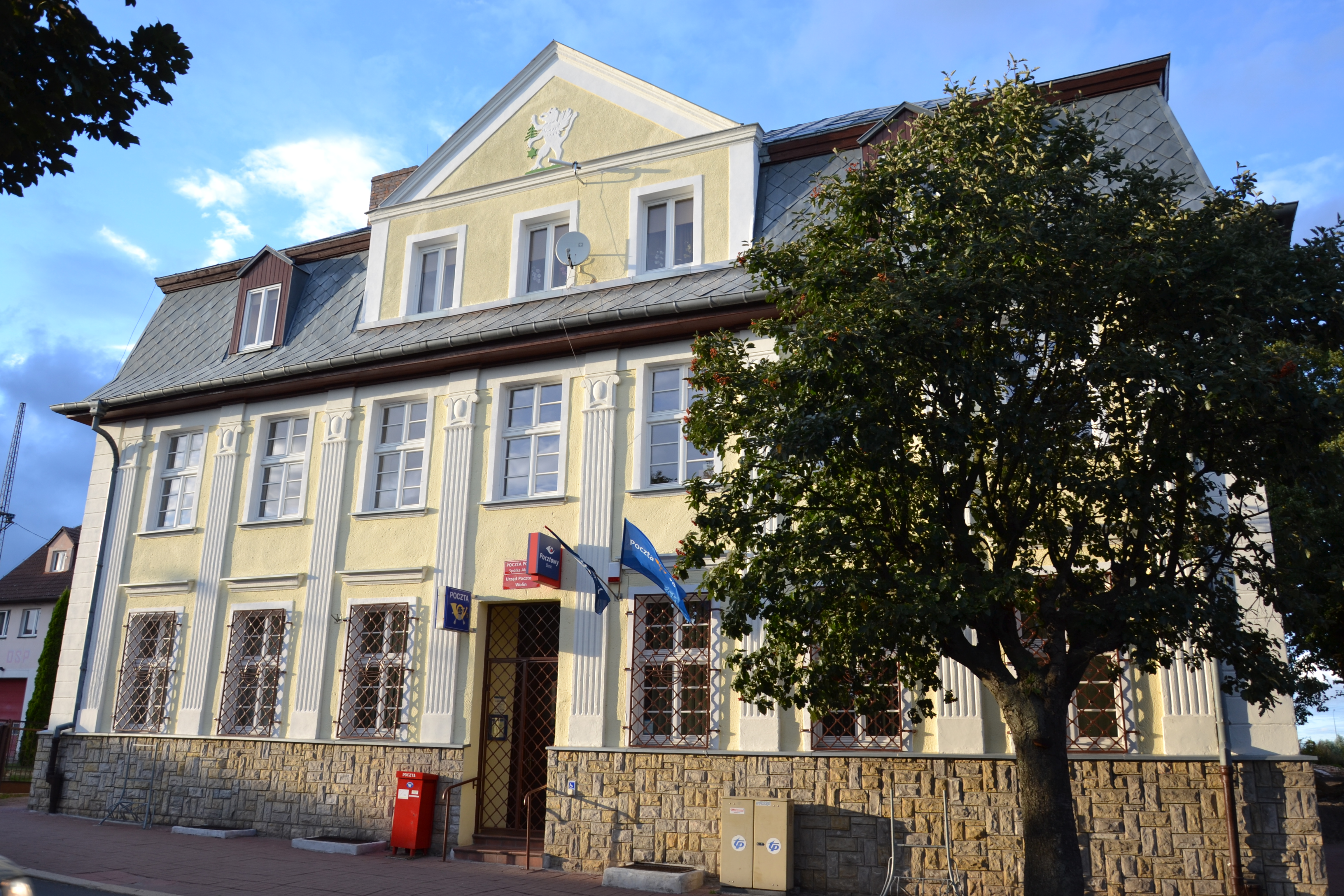 Poczta w Wolinie